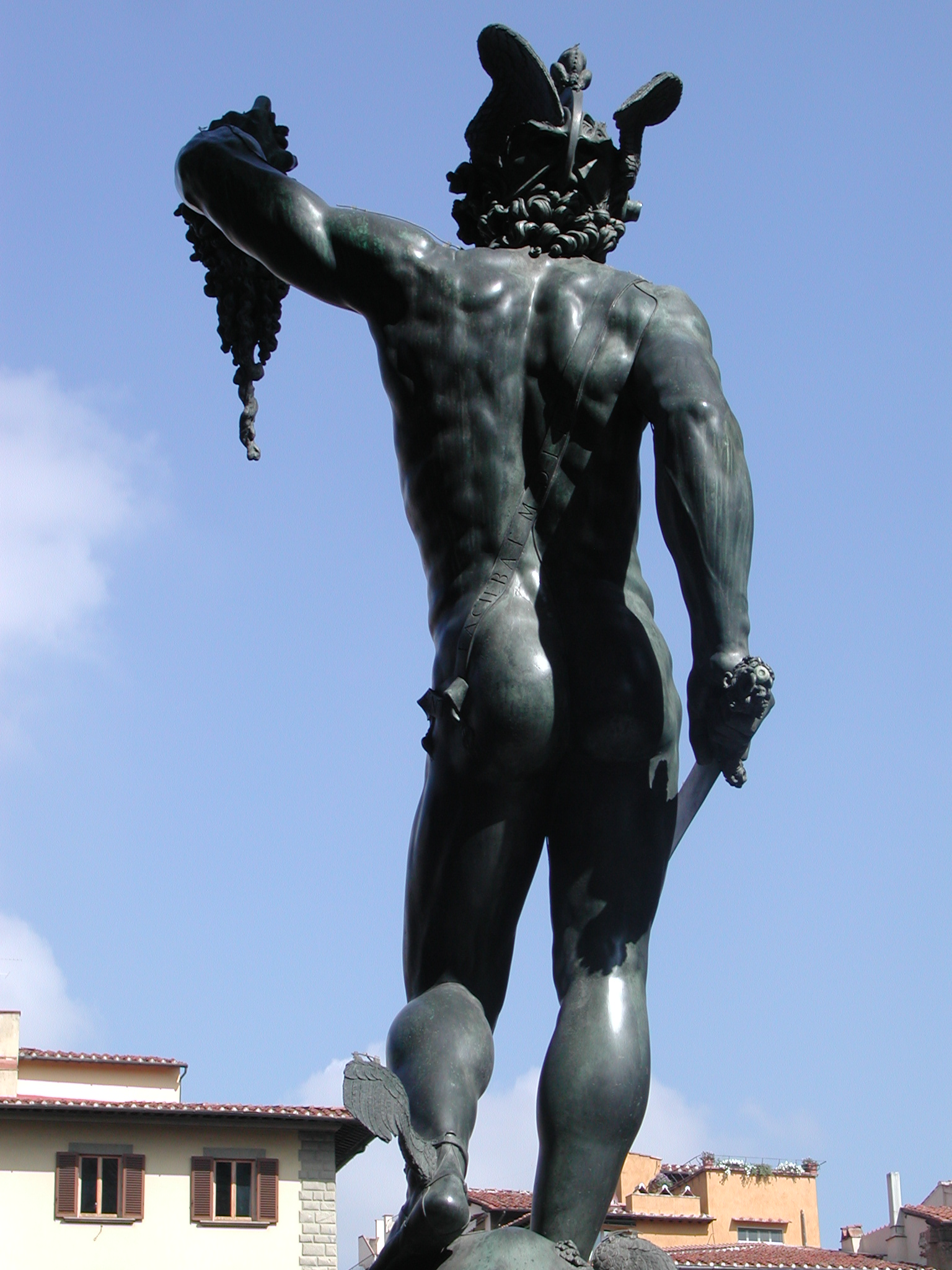 Perseus (Benvenuto Cellini), Loggia dei Lanzi, Firenze